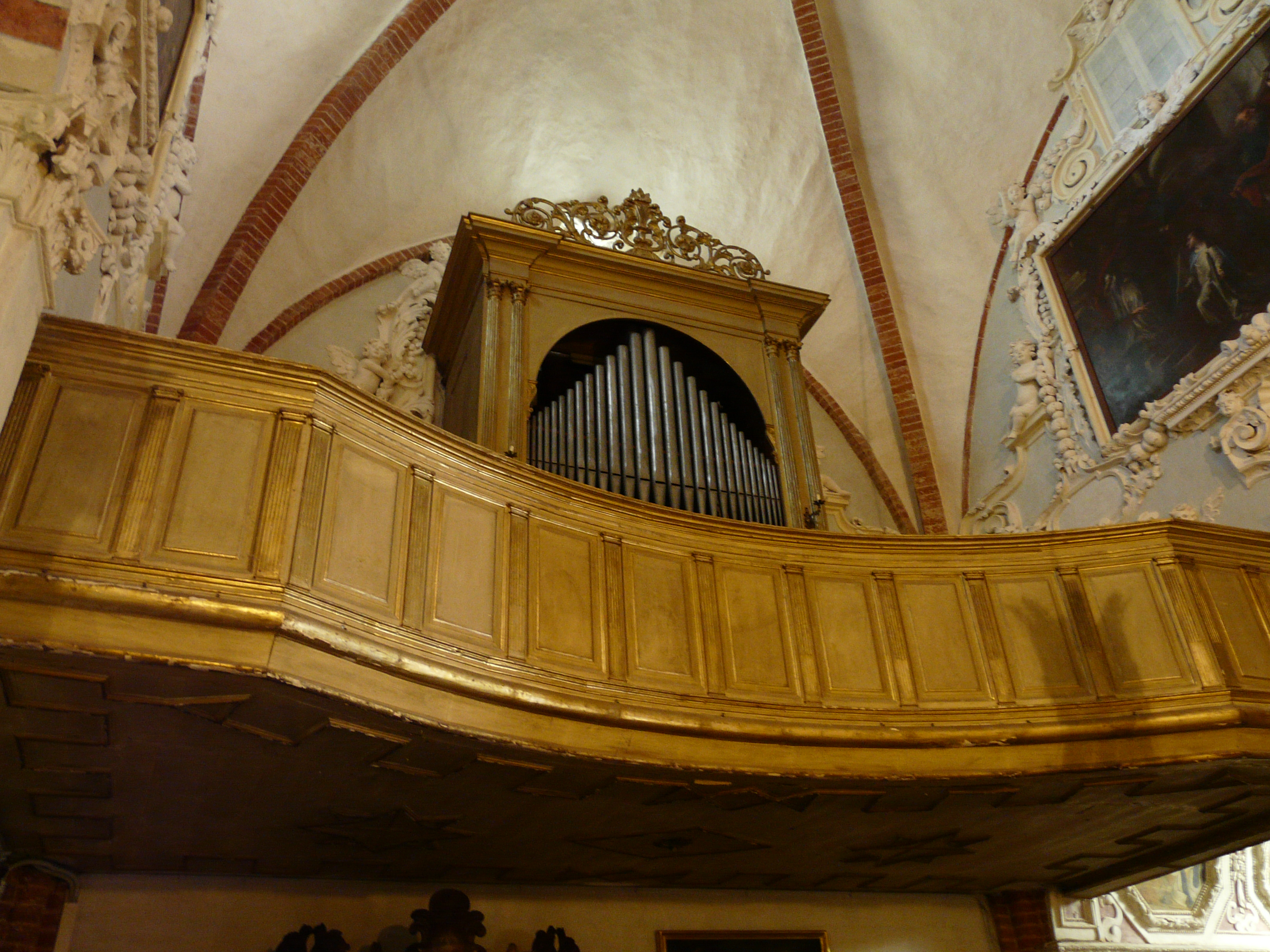 Organo e palco dell'abbazia di Santa Maria di Casanova, frazione di Casanova, Carmagnola, Piemonte, Italia